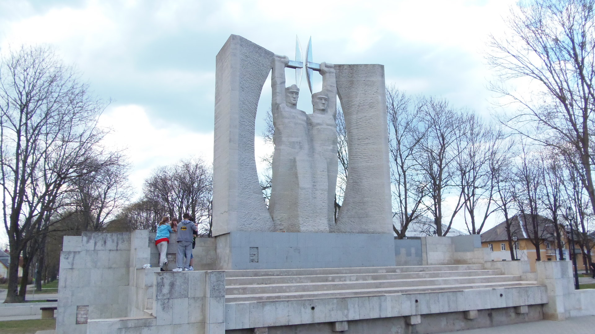 Монумент "Слава Труду" Кохтла-Ярве